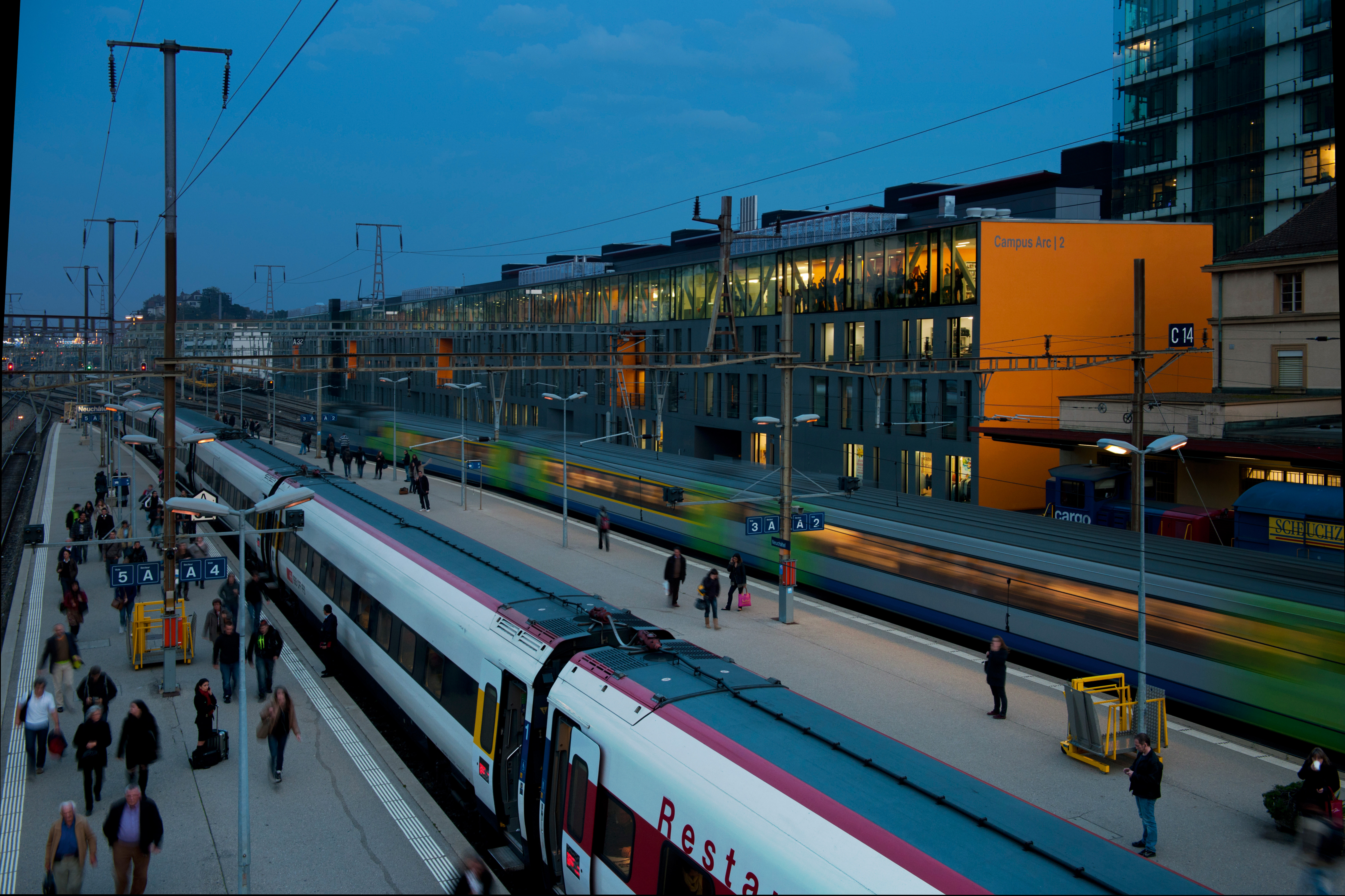 Haute Ecole Arc, Campus de Neuchâtel